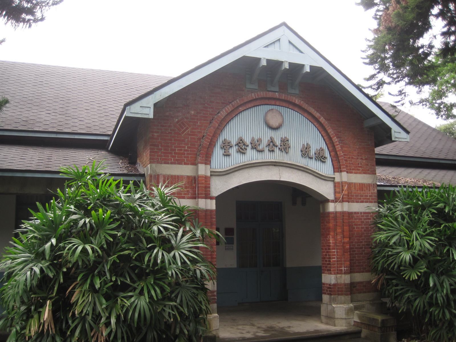 大溪公會堂